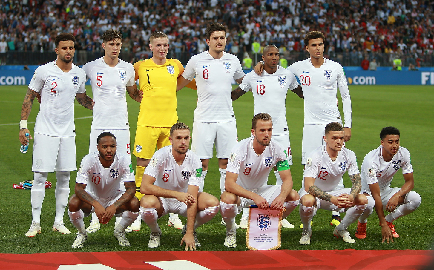 Сборная Хорватии оставила за бортом финала ЧМ-2018 команду Англии